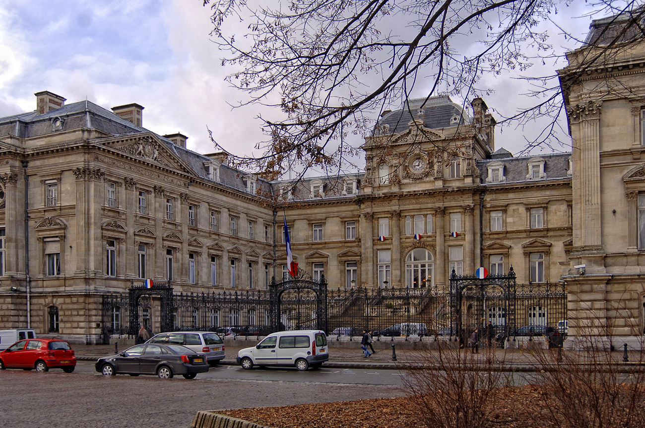 La Prefecture